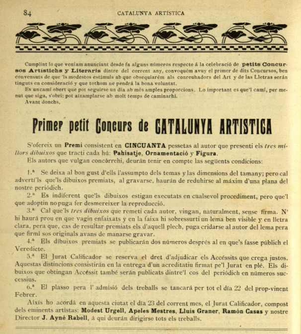 Anunci d'un concurs organitzat per Catalunya Artística